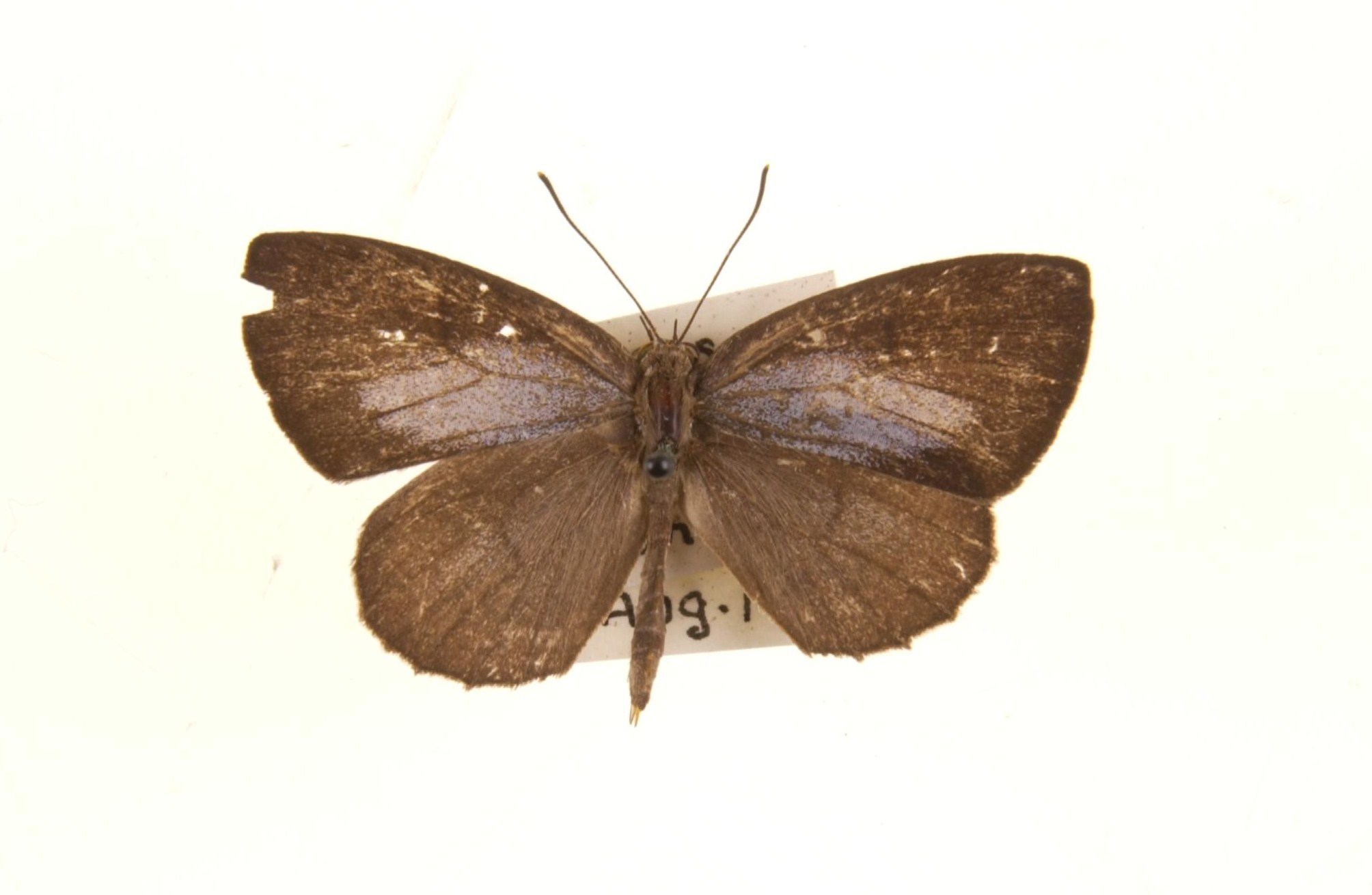 [Arhopala ammon] recte Allotinus subviolaceus